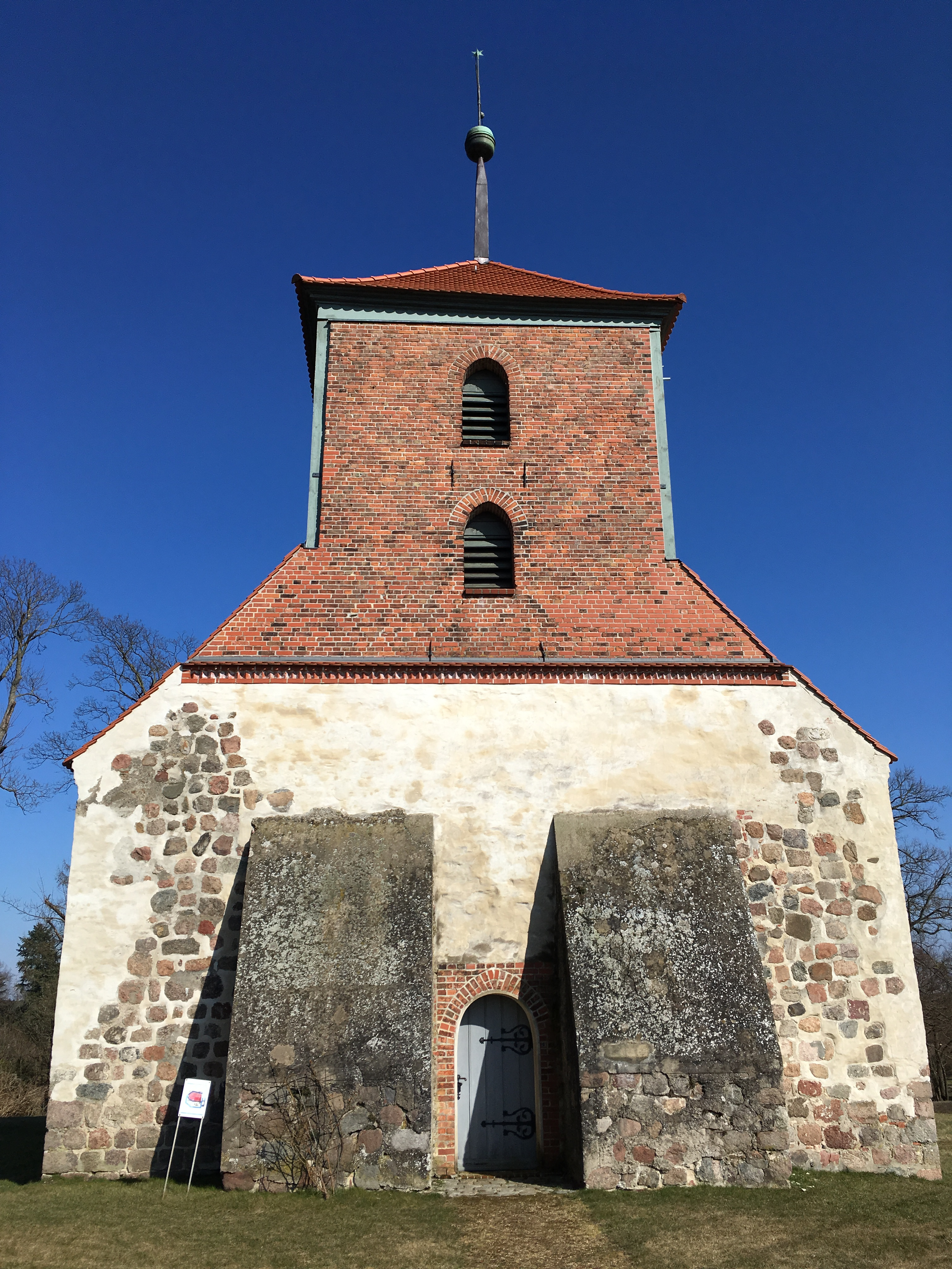 Die Dorfkirche Gielsdorf ist eine Feldsteinkirche aus dem 13. Jahrhundert in Gielsdorf, einem Ortsteil der Stadt Altlandsberg im Landkreis Märkisch-Oderland in Brandenburg. Im Innern steht unter anderem ein Altarretabel aus der Zeit um 1500.